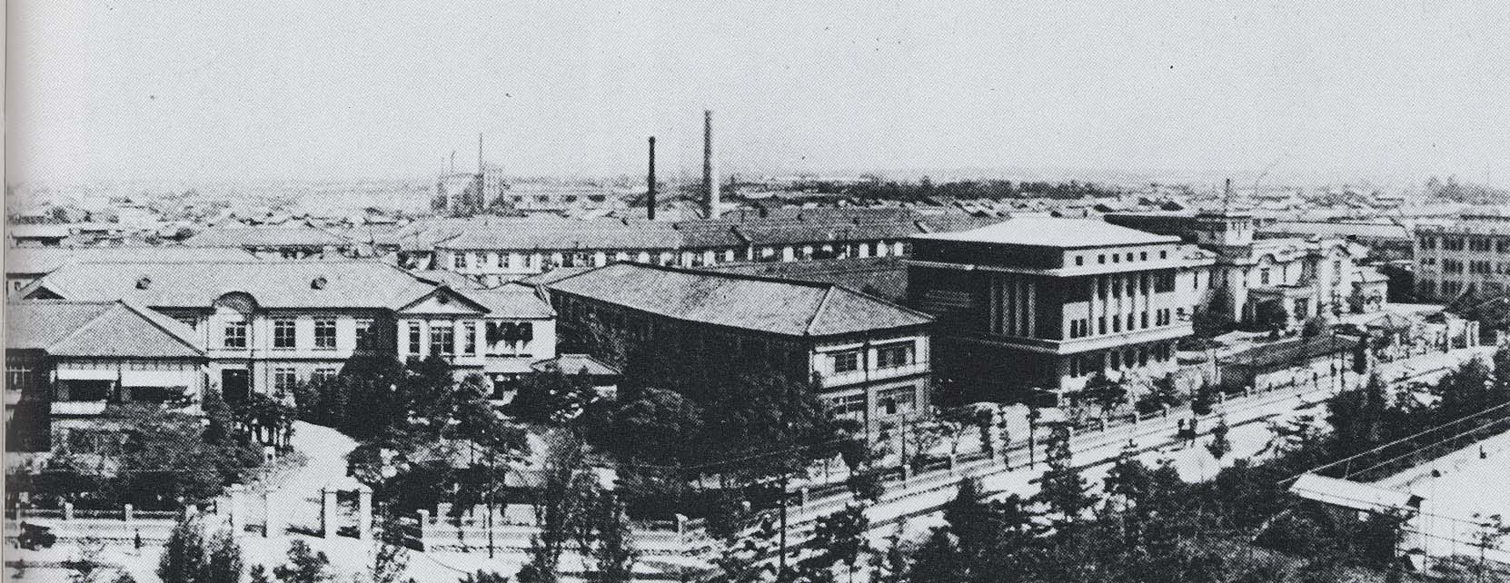 名古屋帝国大学医学部全景